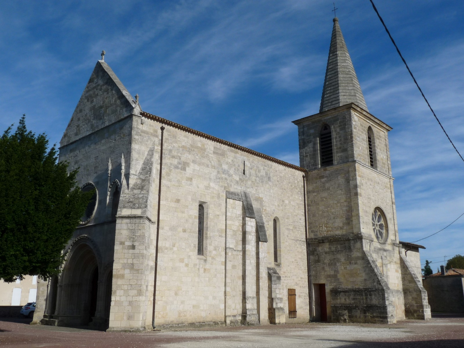 Eglise de Berson, Gironde, France